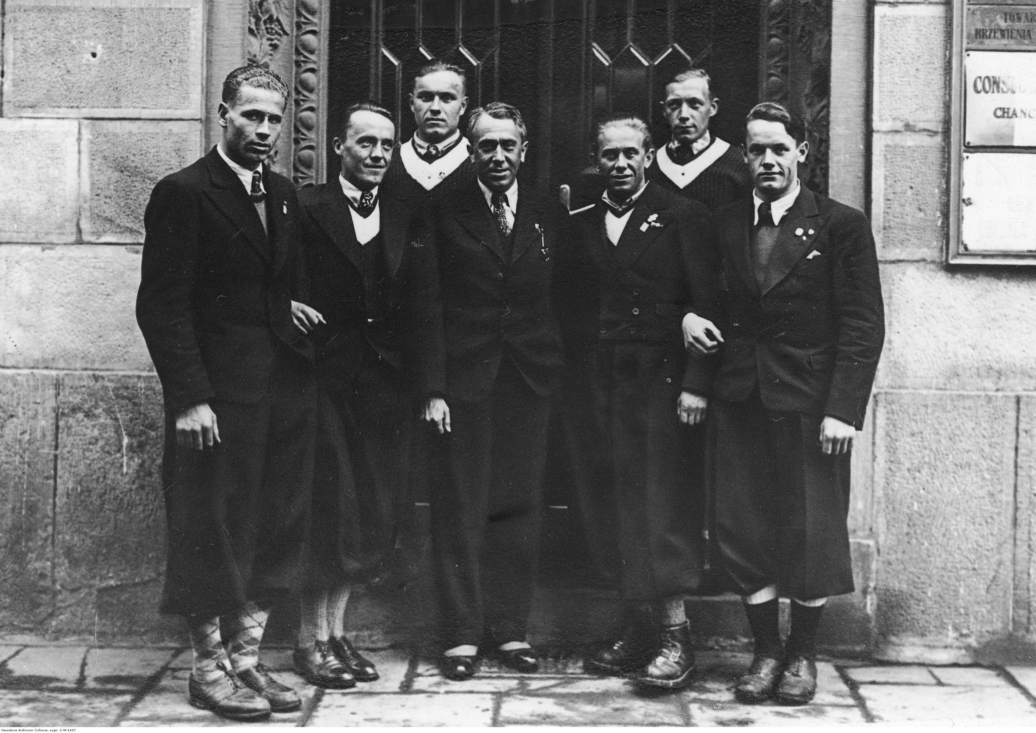 Wyjazd polskiej ekipy na Mistrzostwa Świata w Narciarstwie Klasycznym FIS w Solleftea. Członkowie ekspedycji narciarskiej Polskiego Związku Narciarskiego przed wyjazdem z Krakowa na Mistrzostwa FIS. Stoją od lewej - Stanisław Marusarz, Bronisław Czech, Stanisław Karpiel, red. Stanisław Faecher, Izydor Gąsienica-Łuszczek, Piotr Kolesar, Andrzej Marusarz. 1934-02 (Koncern Ilustrowany Kurier Codzienny - Archiwum Ilustracji)